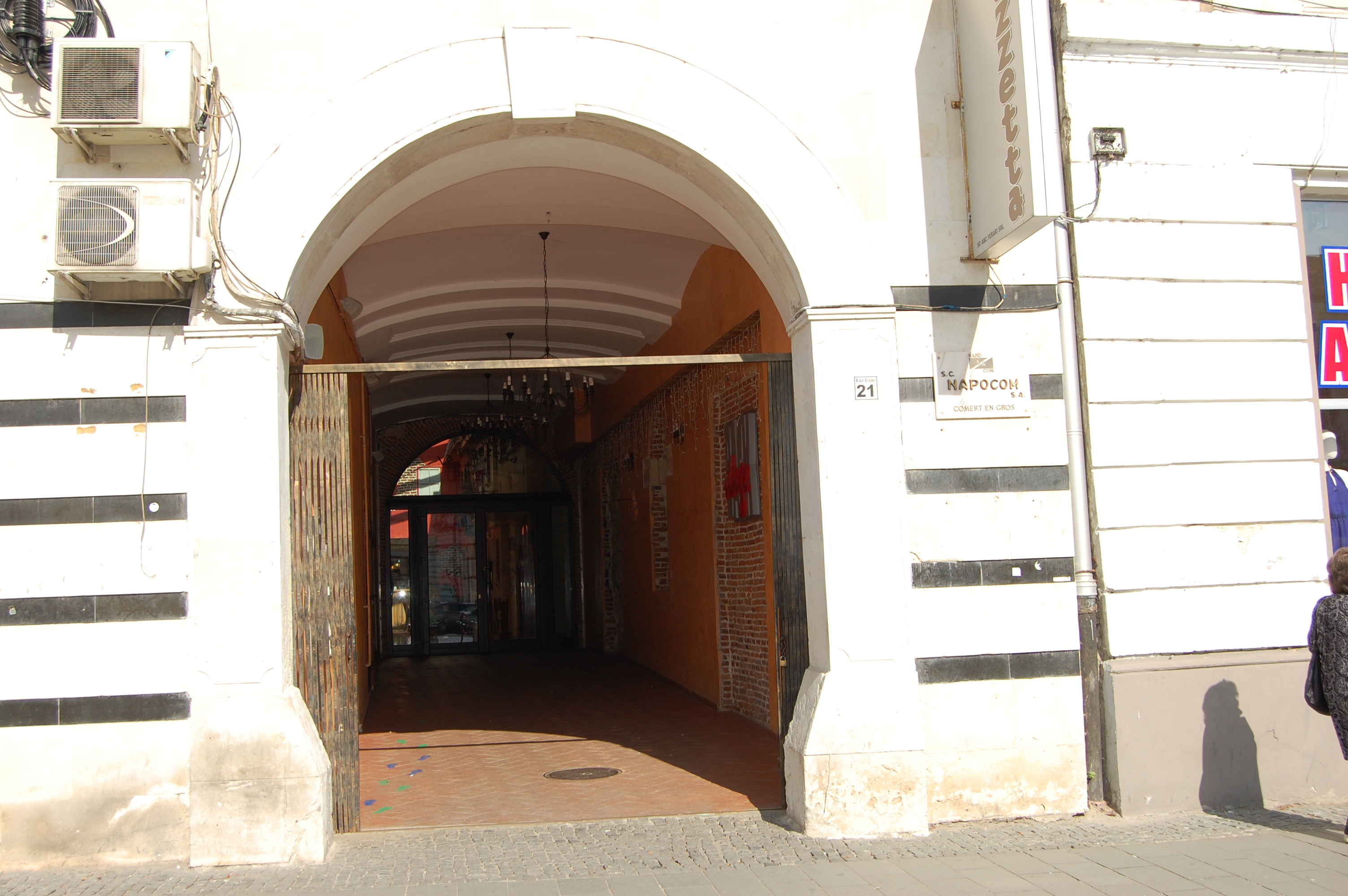 Casă, intrarea